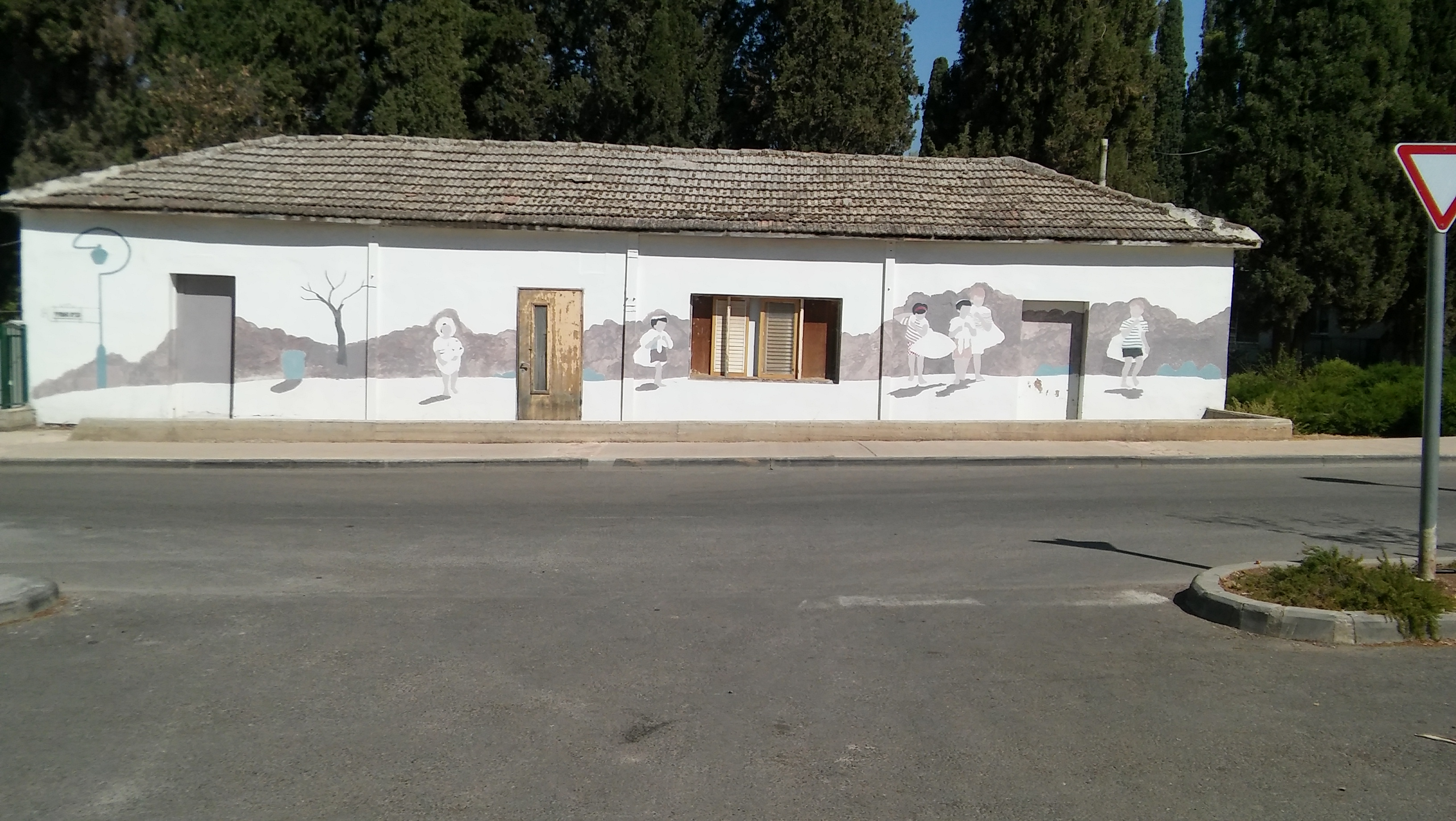 איילת השחר - מבני הפרסה - בית 8